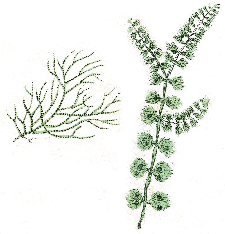 Batrachospermum gelatinosum, Illustration from «Naturgeschichte des Pflanzenreichs», table LII